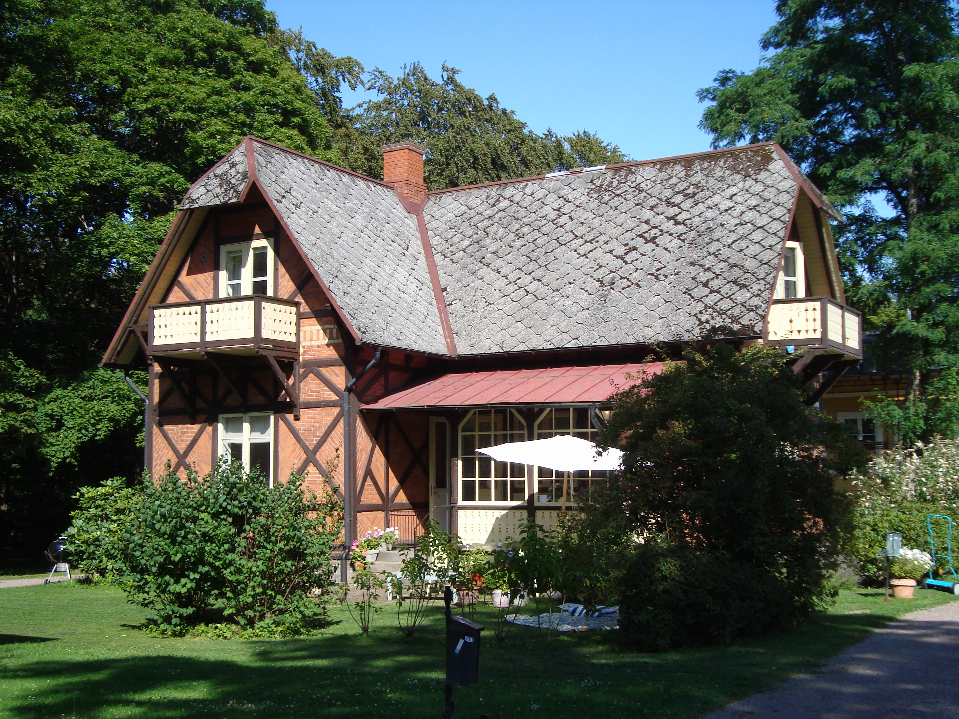 Villa Veronika i Ramlösa brunnspark i Helsingborg.